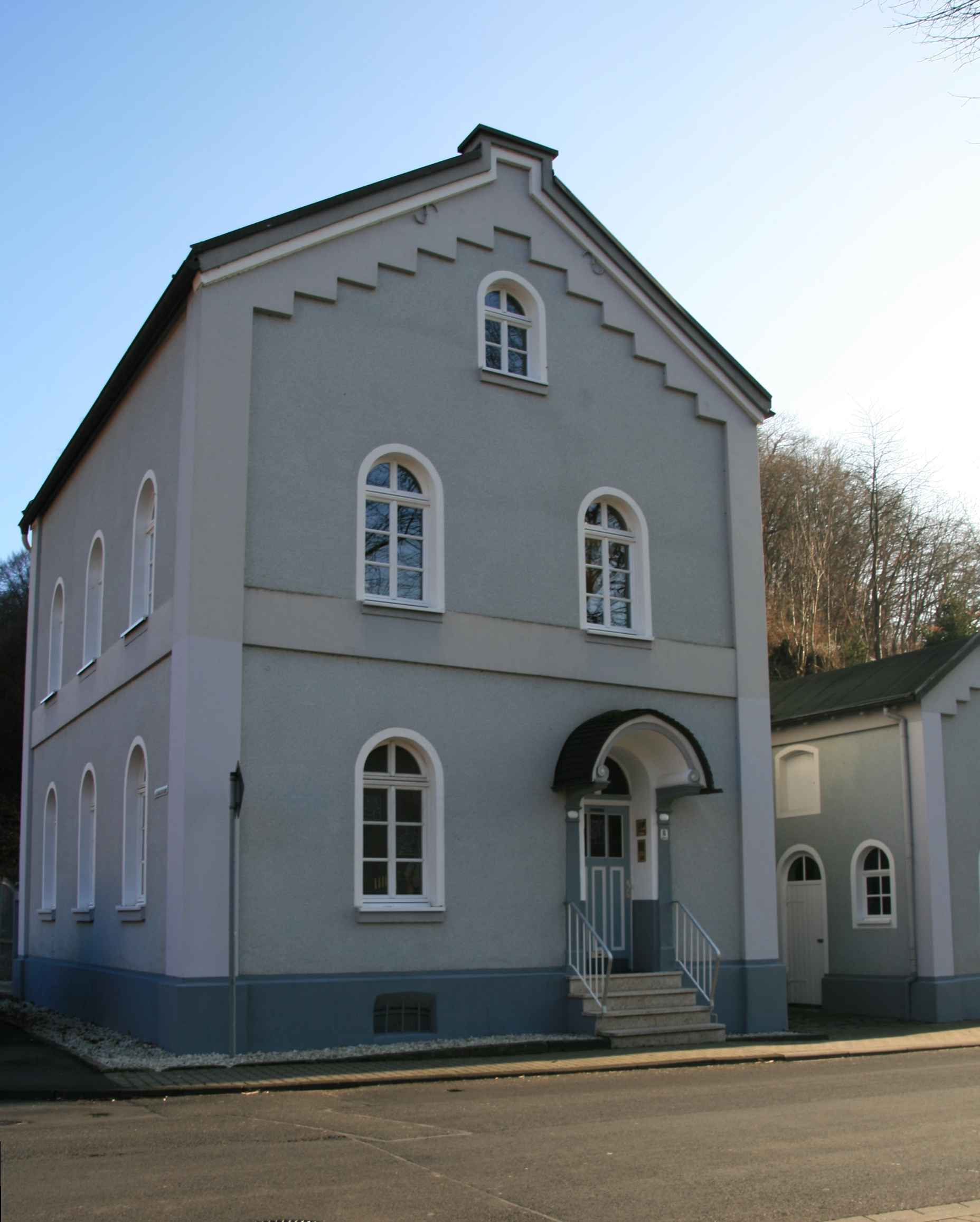 Grube Friedrichssegen: Gebäude der Gleiswaage der Grubenbahn. Friedrichssegen, Orteil von Lahnstein, Rheinland-Pfalz.